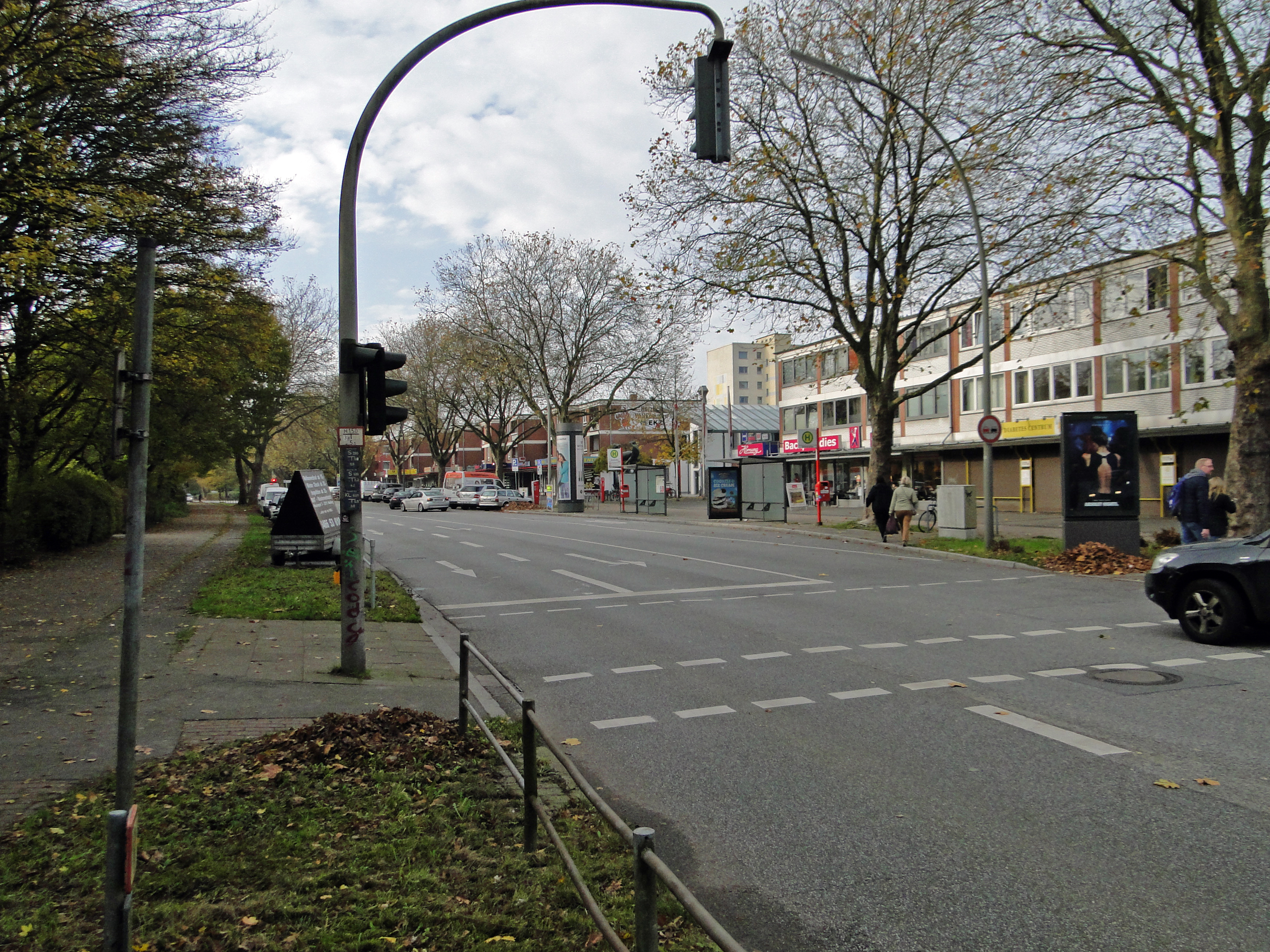 Bushaltestelle Dannerallee. Vorgesehener Standort des U-Bahnhof Dannerallee